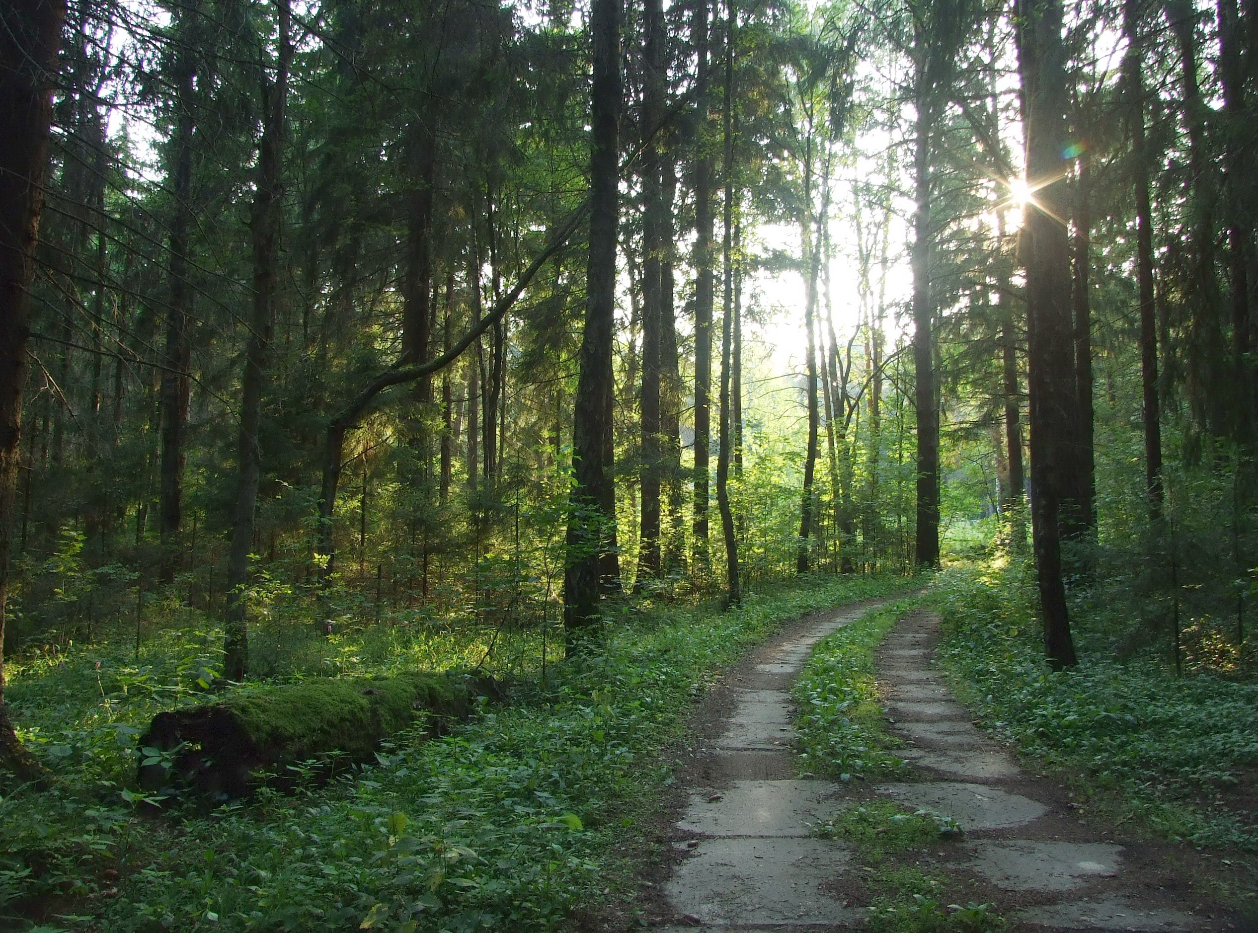 Внуковский лес